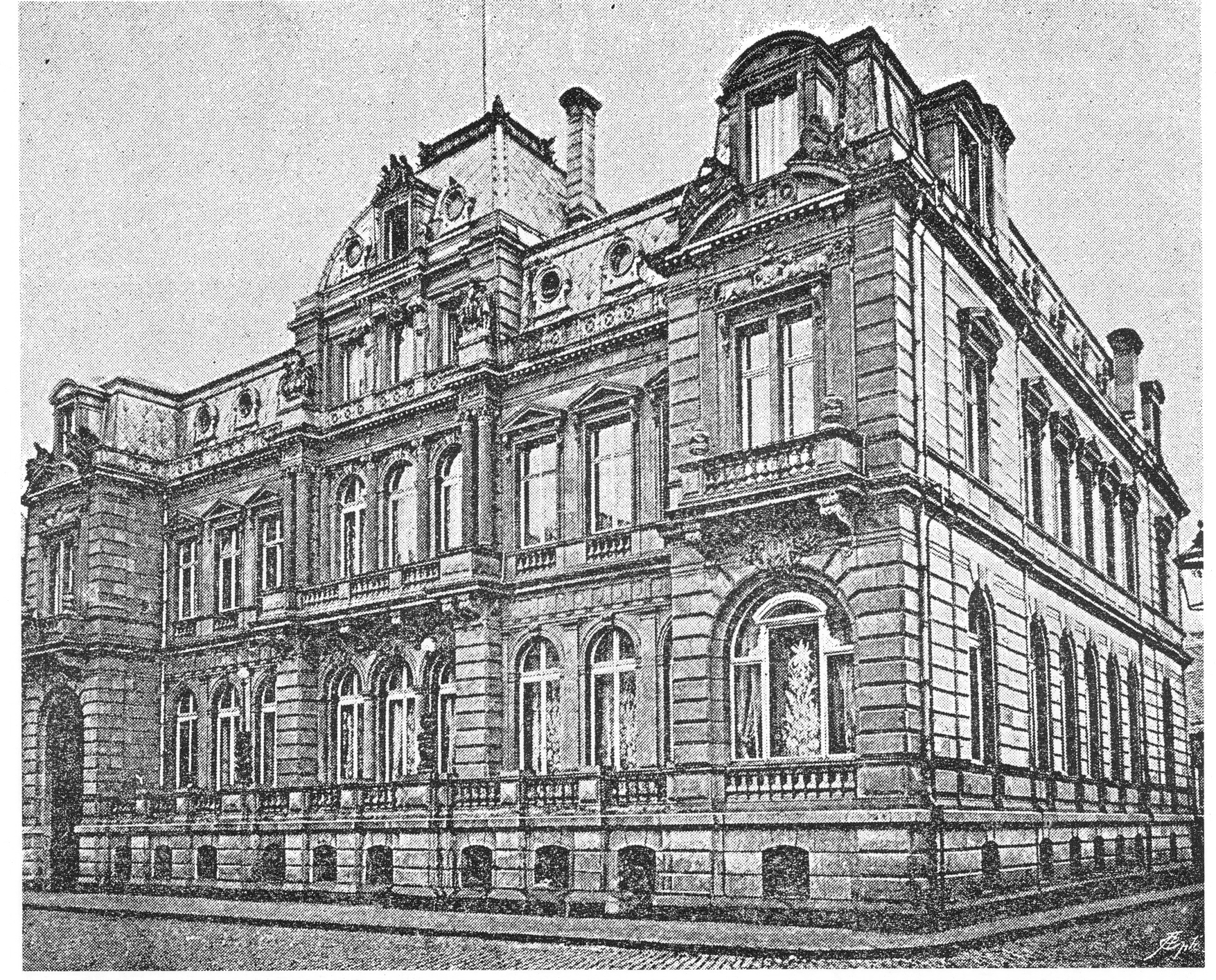 Haus Eduard von Oppenheim, Unter Sachsenhausen 37 in Köln, 1870 Architekten Wilhelm Hoffmann für Eduard Freiherr von Oppenheim (1831–1909).jpg